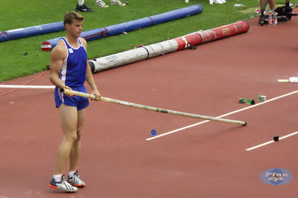 Jean Galfione aux Championnats du monde d'Helsinki en 2005.